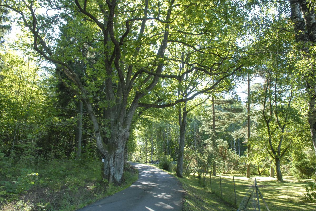 Skjerpeeika er et stort, hult eiketre.